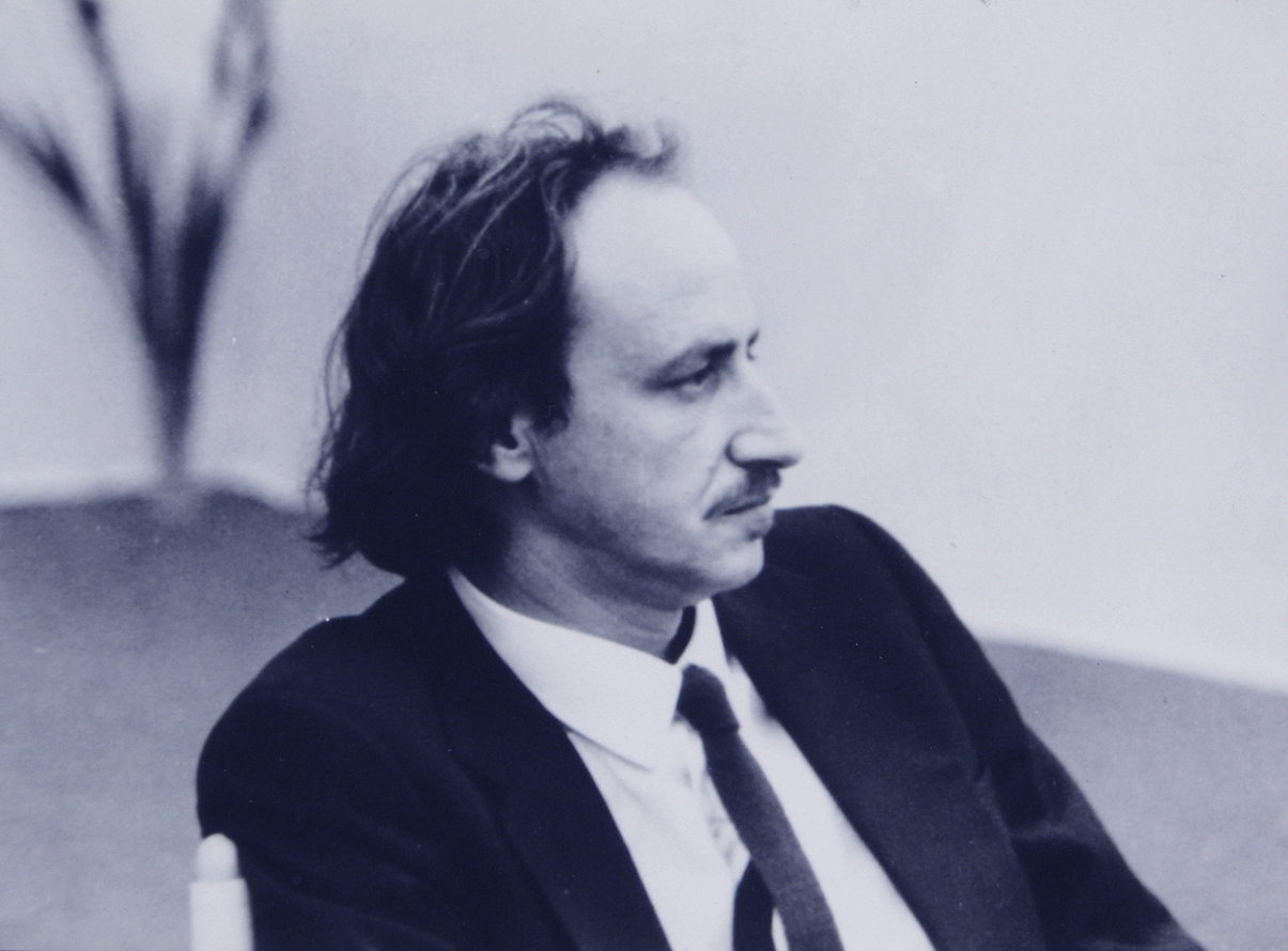 Dr. Hugo Heyrman - Paris, 1981